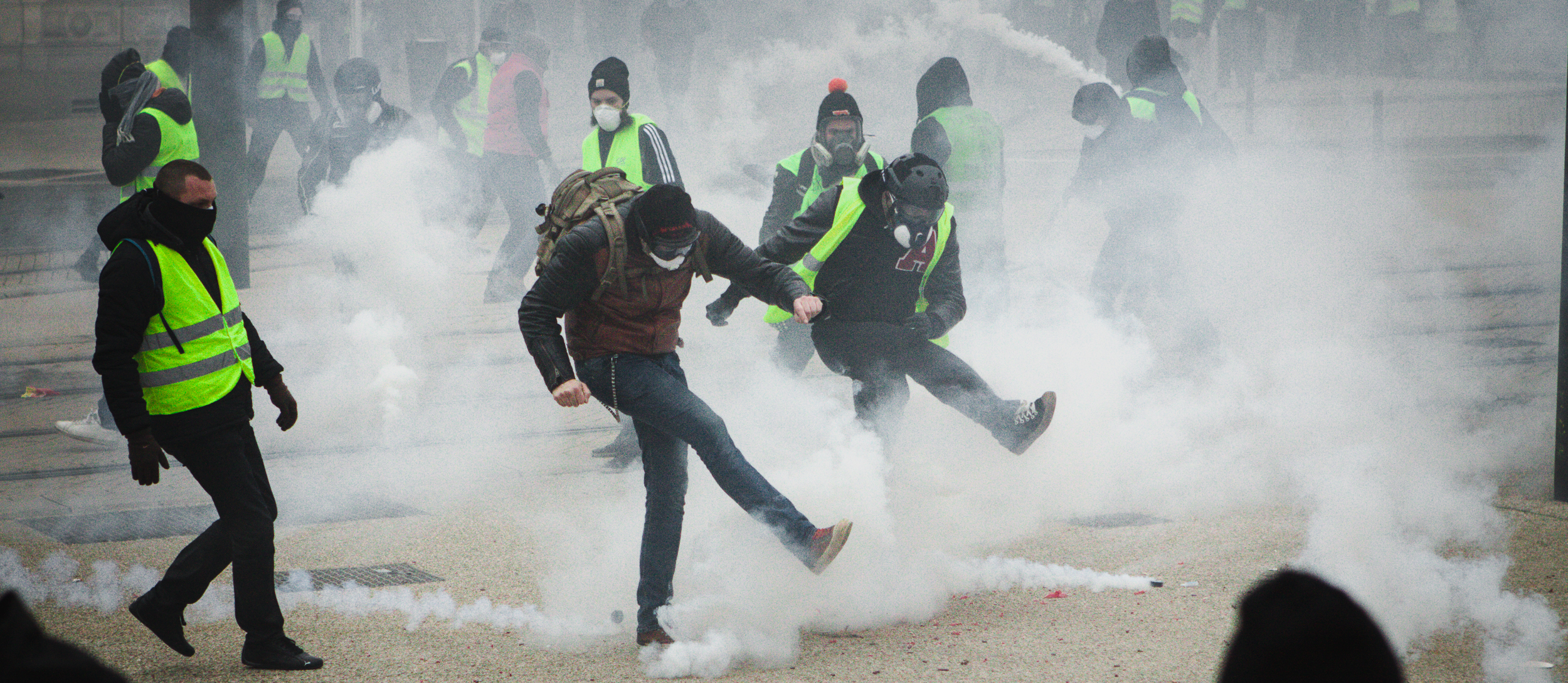 Acte IX